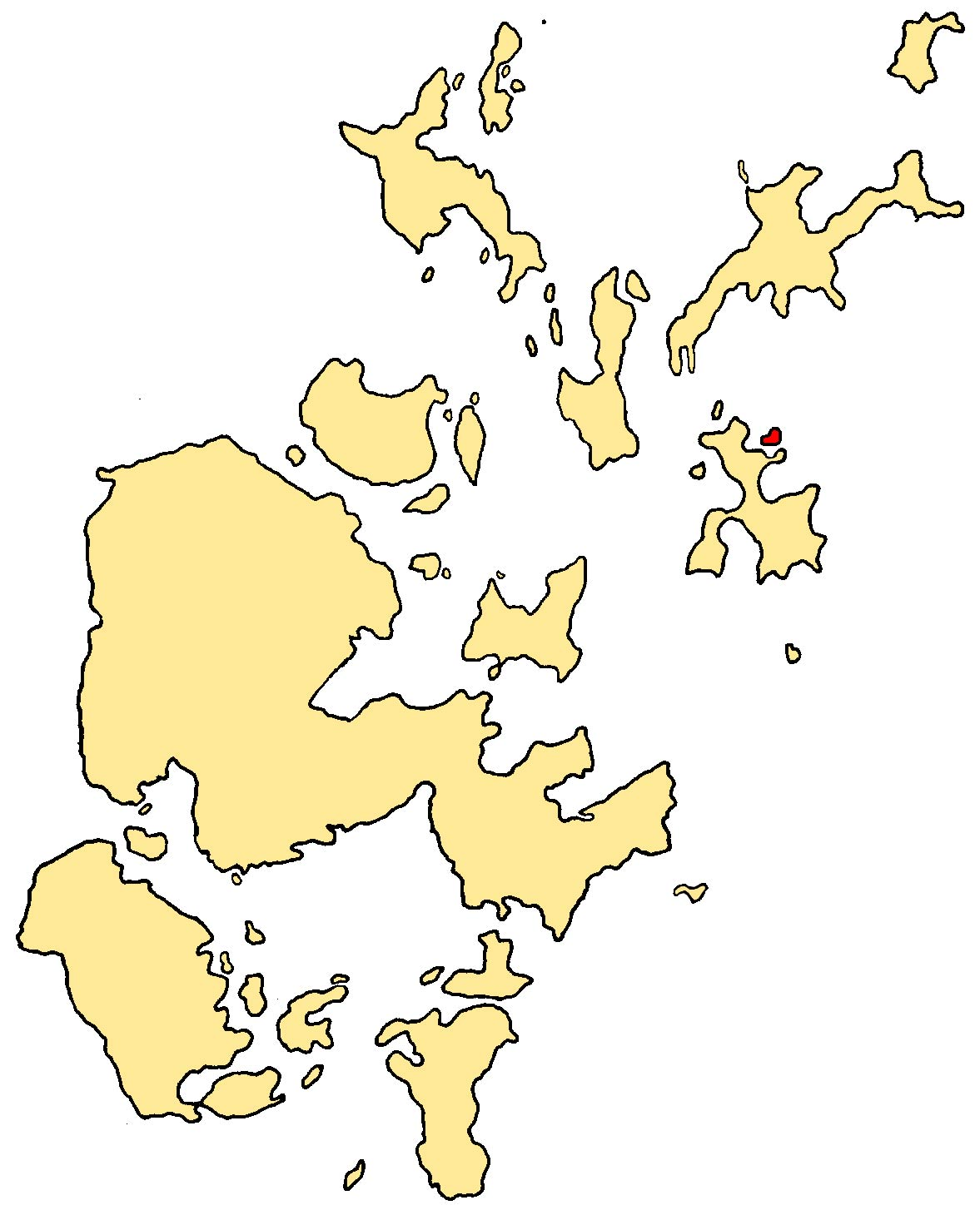 Papa Stronsay